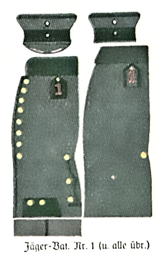 Felduniform der preußischen Jägerbataillone.